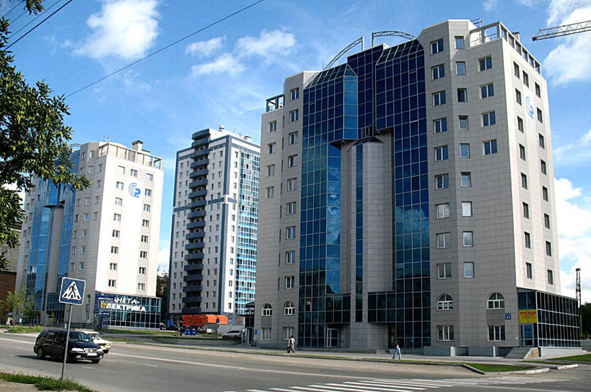 Новосибирск, пл. Станиславского Новые жилые дома.